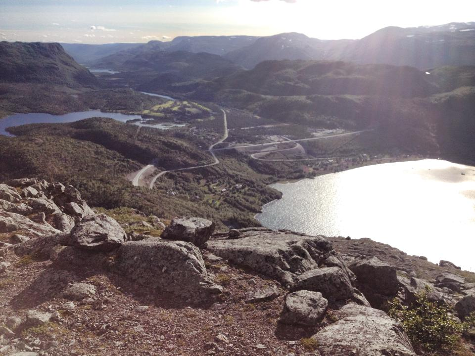 Bilde av Kvenvik tatt fra Skoddevarre.